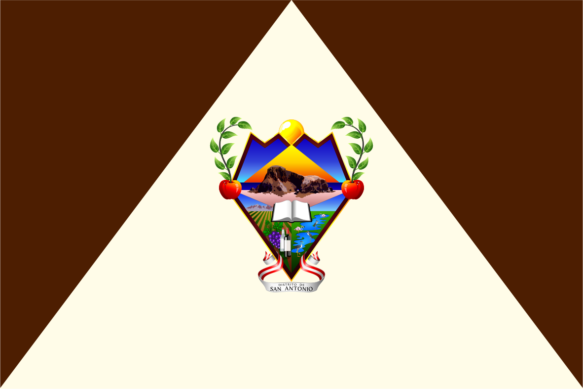 Distrito de San Antonio - Provincia de Cañete - Región Lima